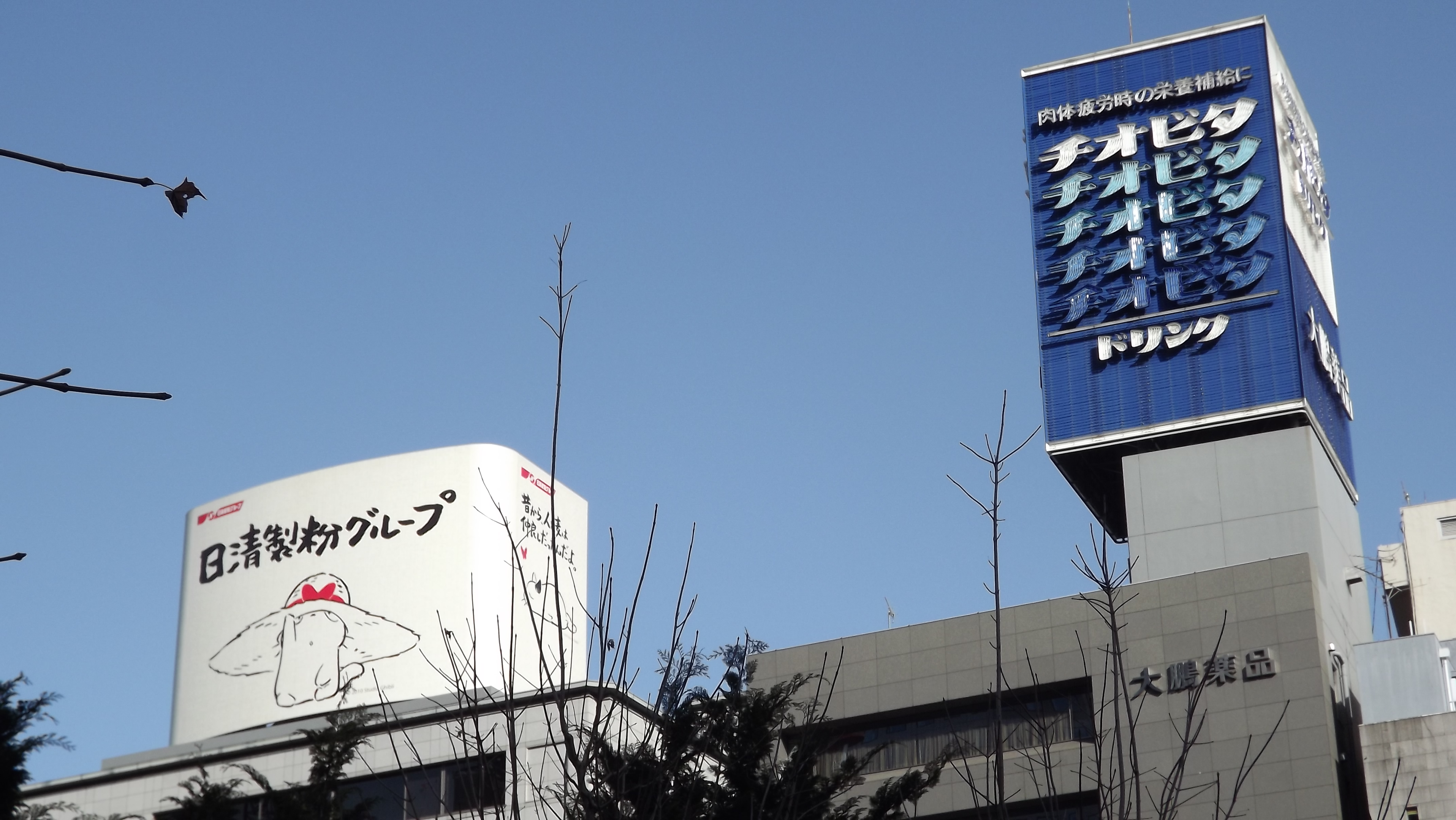 [1] 日清製粉グループとコニャラについて